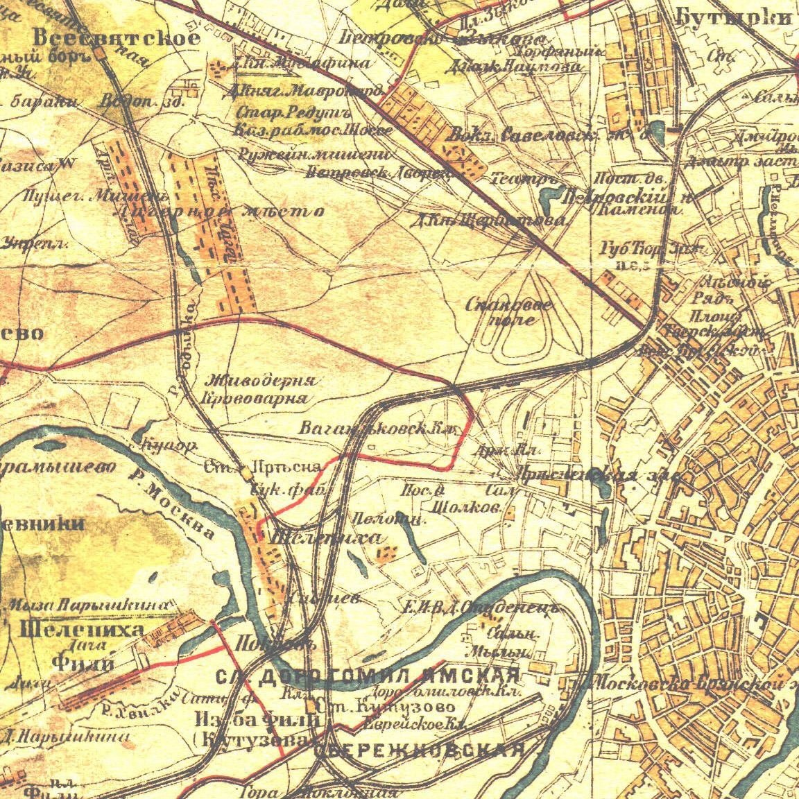 Фрагмент карты Окрестностей Москвы 1900 года